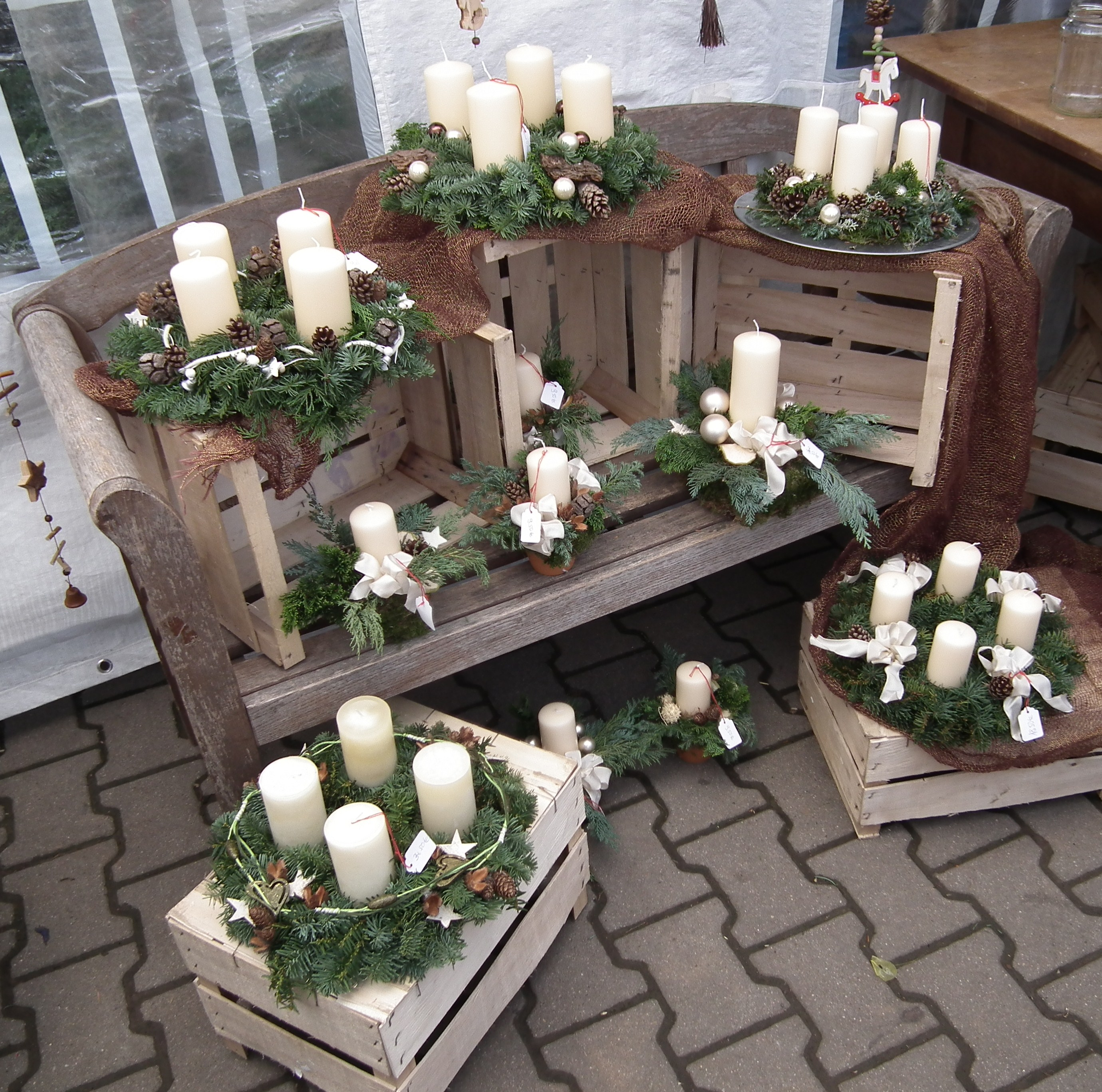 Adventskränze und -gestecke mit weißen Kerzen